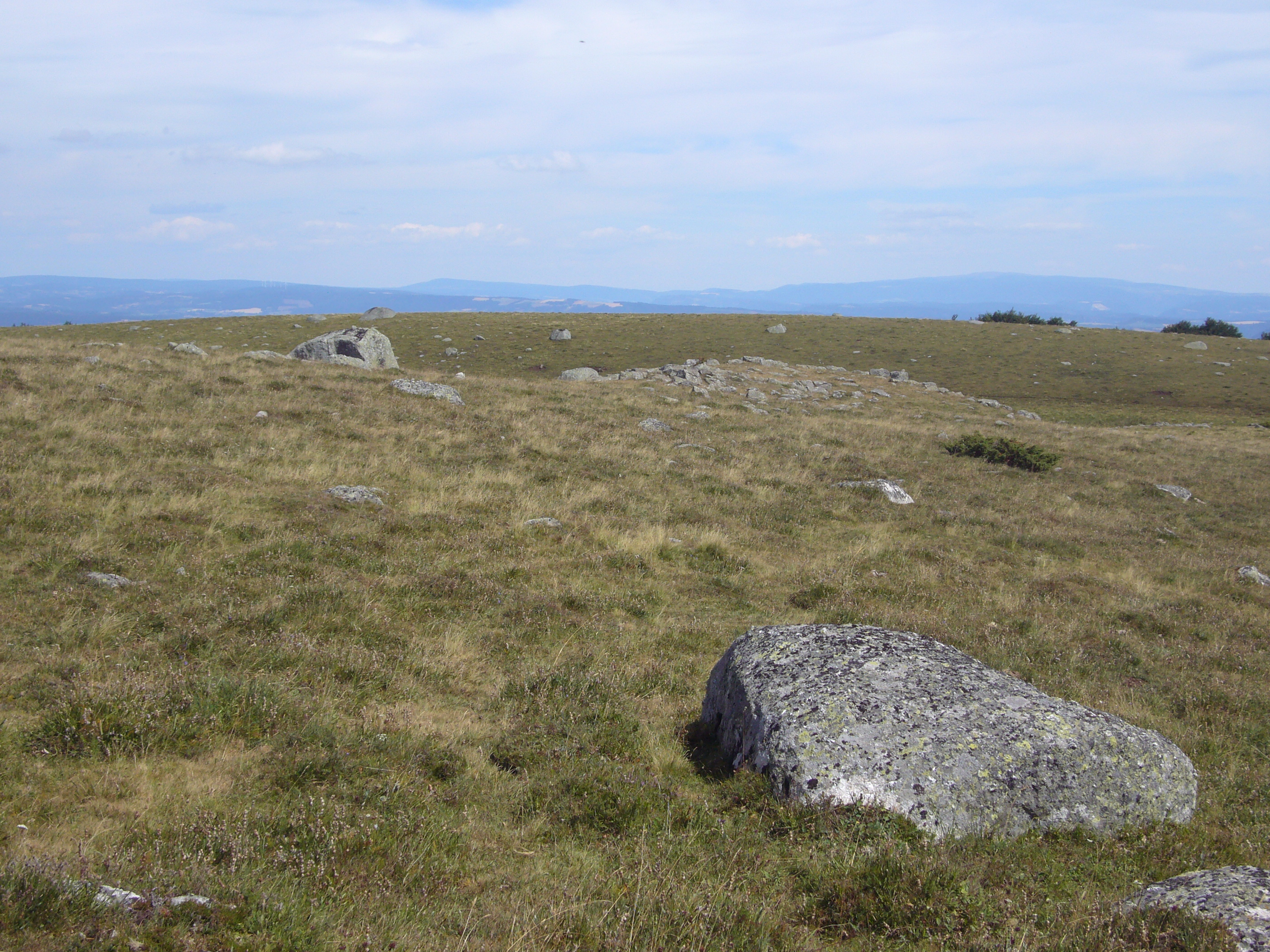 Montagne de Rabios (Aubrac, Massif central, France). Plateau sommital (altitude de 1330 à 1350 m).